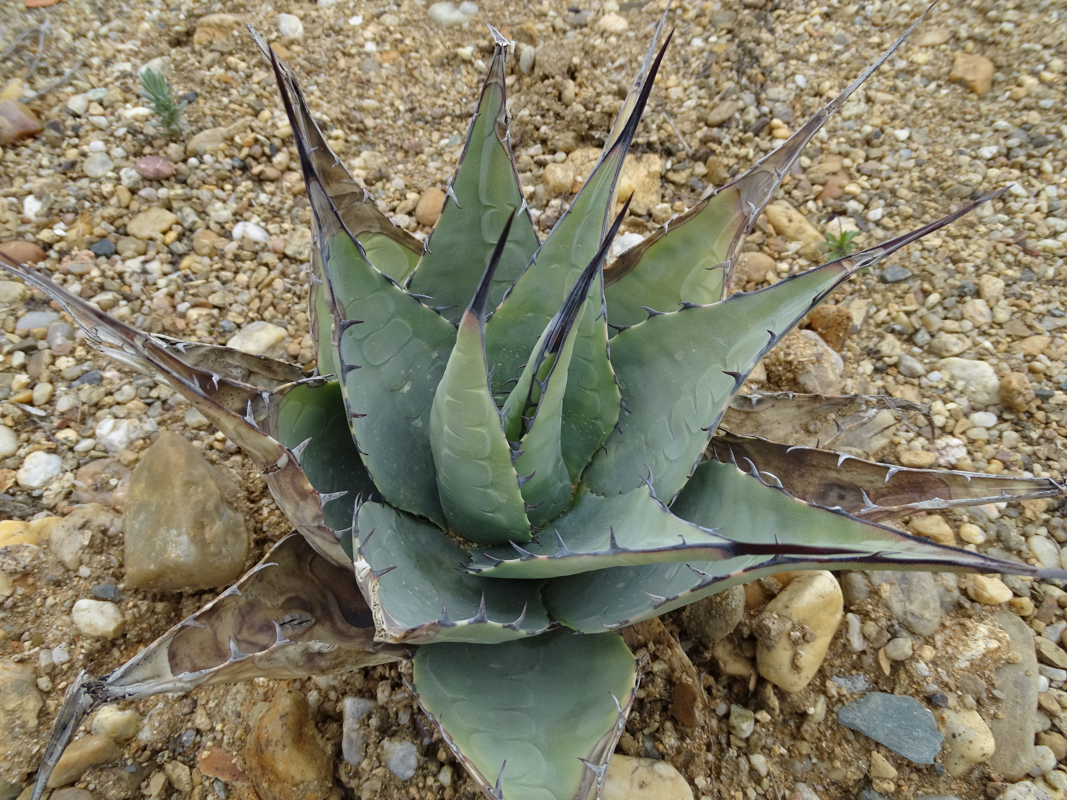 Botanická zahrada Praha